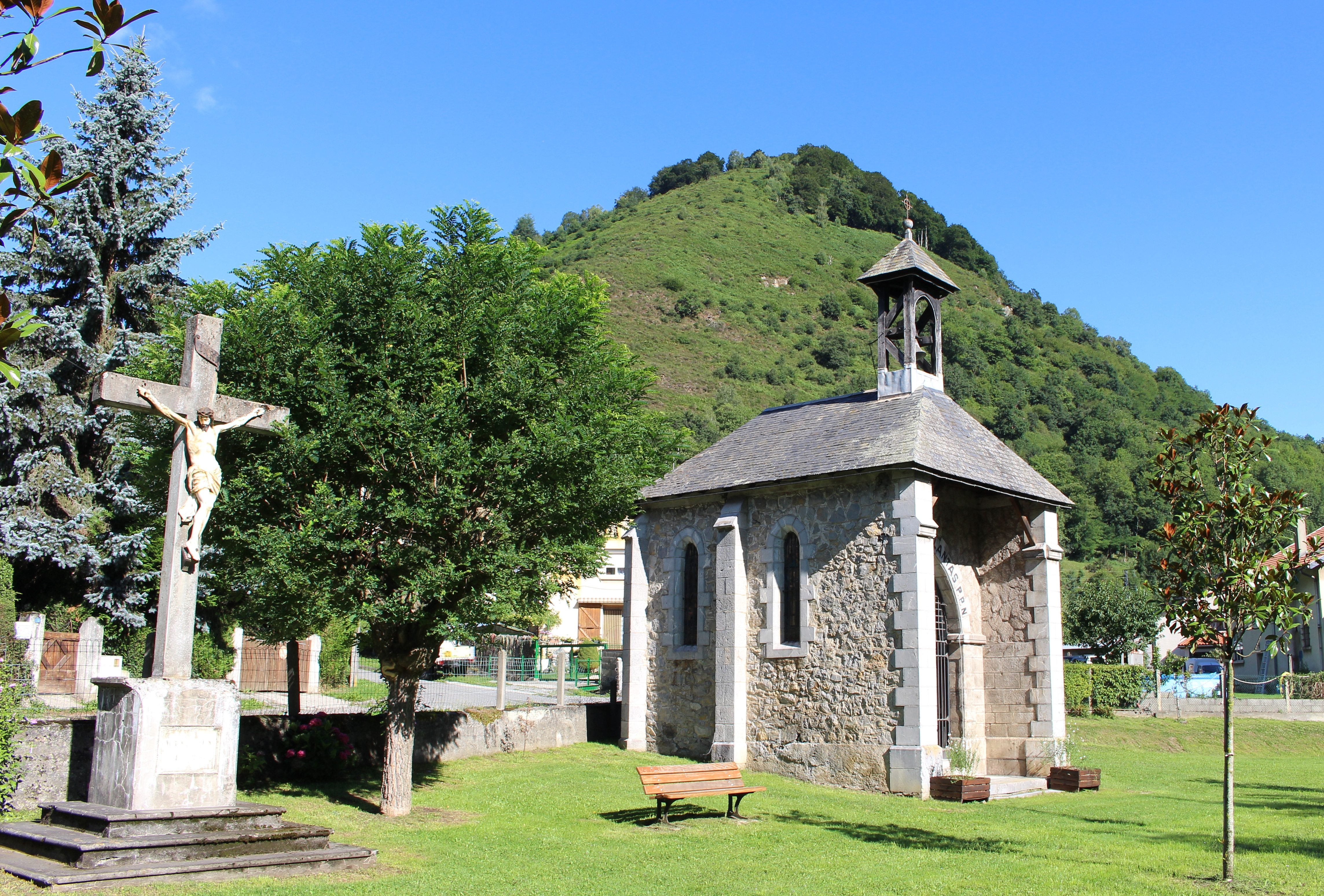 Chapelle Notre-Dame d'Esplantats de Sarrancolin (Hautes-Pyrénées)